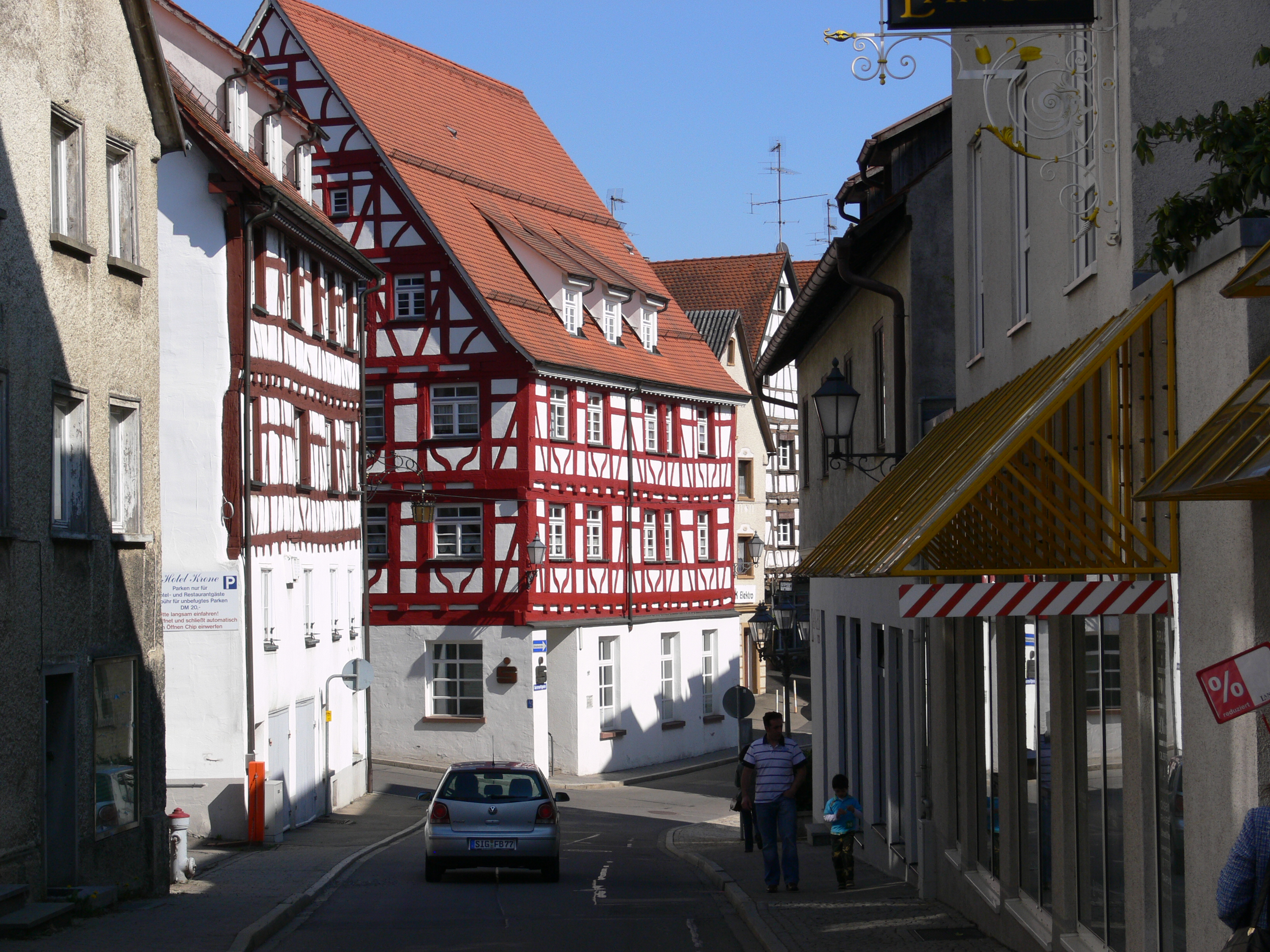 Pfullendorf, Blick in die Hauptstraße